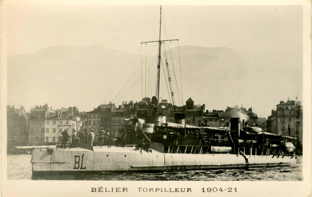 Contre-torpilleur français : Bélier (Classe Arquebuse)